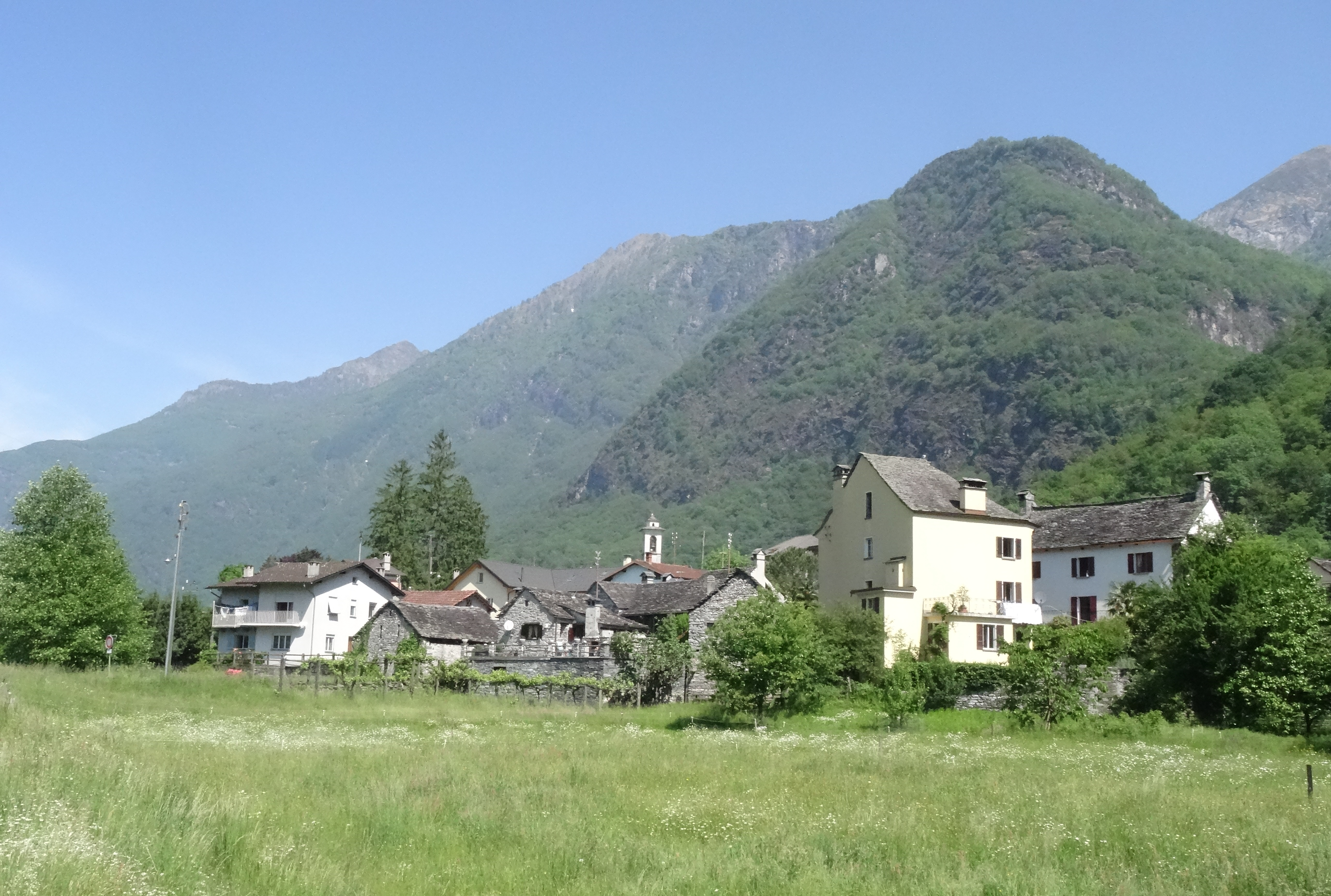 Coglio